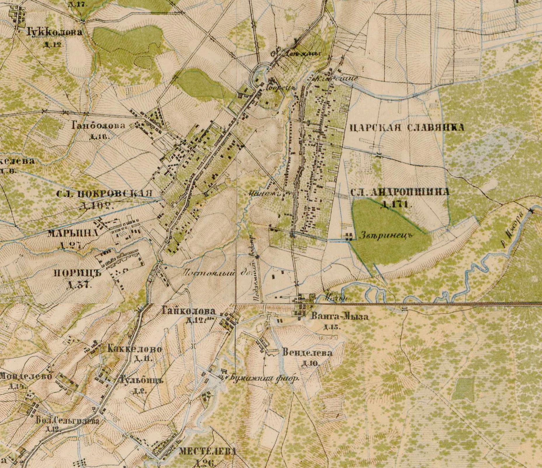 Царская Славянка на карте 1885 года.